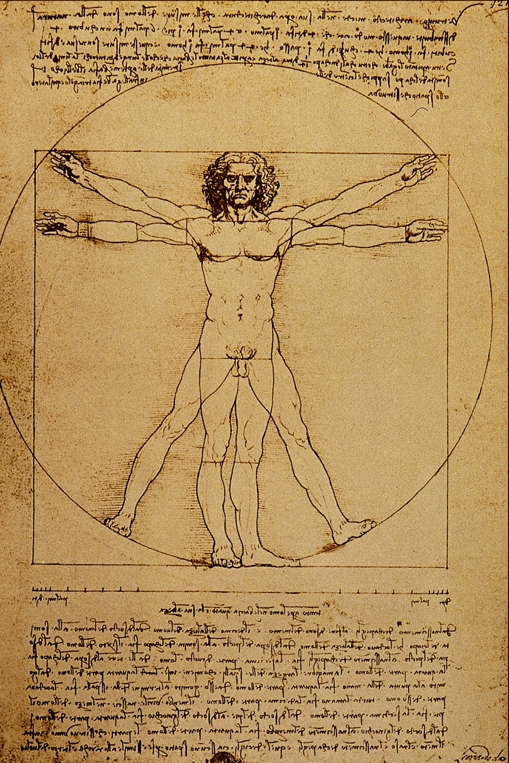 Studio del Corpo Umano